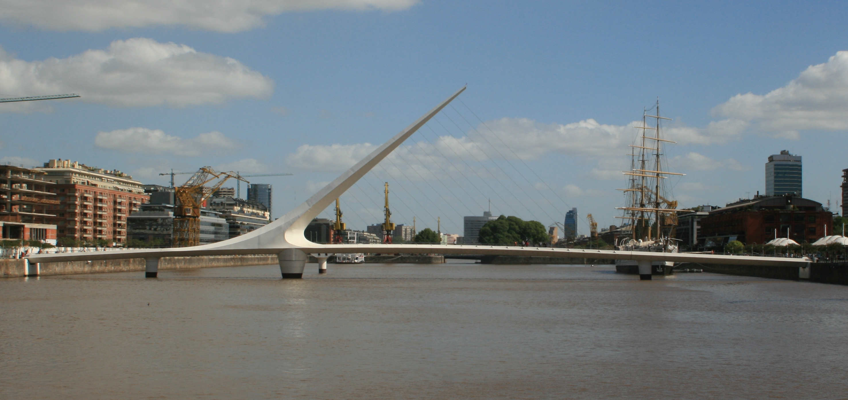 Puente de la Mujer, Buenos Aires